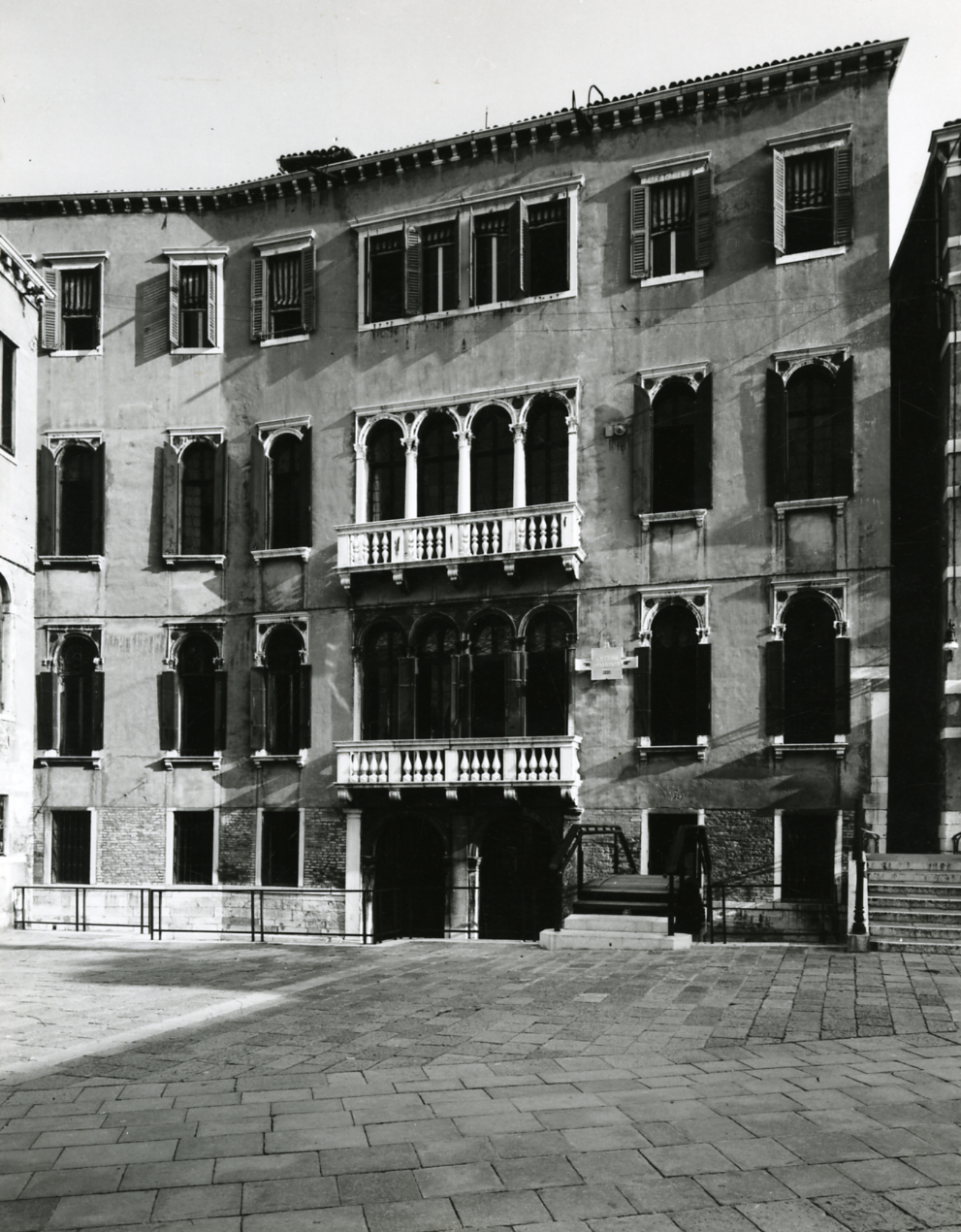 Servizio fotografico : Venezia, 1963 / Paolo Monti. - Stampe: 4 : Positivo b/n, gelatina bromuro d'argento/ carta, 24x30. - ((Al verso delle stampe manoscritto numero di negativo corrispondente: 7167, 7174, 7177. - Sul coperchio della scatola, manoscritto a pennarello: "Musei". - Occasione: Documentazione del restauro dell'architetto Carlo Scarpa realizzato sul pianterreno e il giardino della Fondazione Querini Stampalia di Venezia. - Fonte: Rubrica di Paolo Monti: Archivio 10x12 (ultimi numerati) - dal G1 al (s.d.), presso Archivio Paolo Monti